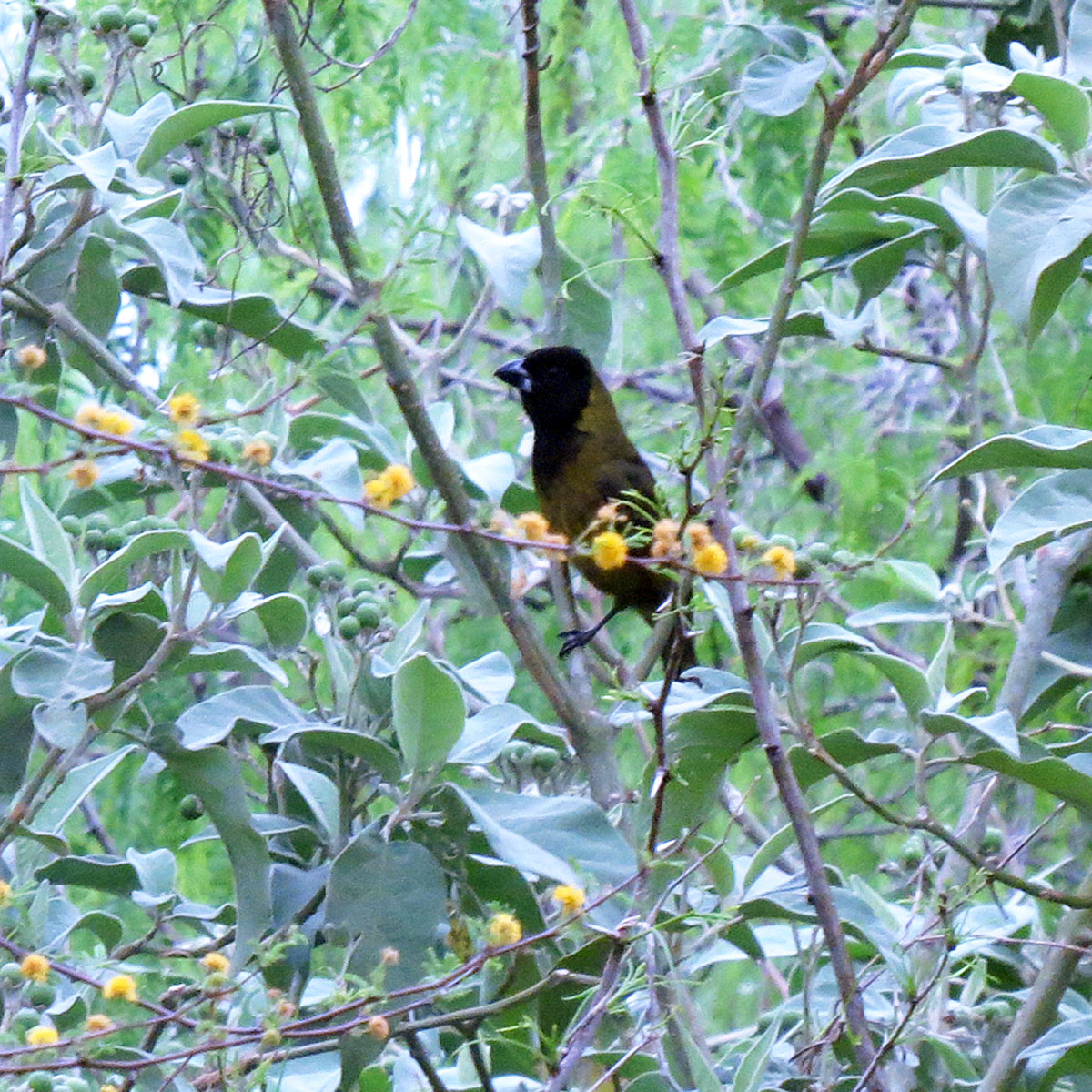 Rhodothraupis celaeno 16 mar 16 Laguna Atascosa NWR, Texas